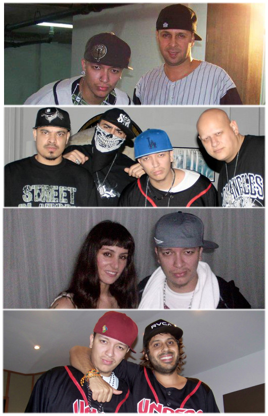 Tony Touch. La Mala, Psycho Realm y Florentino